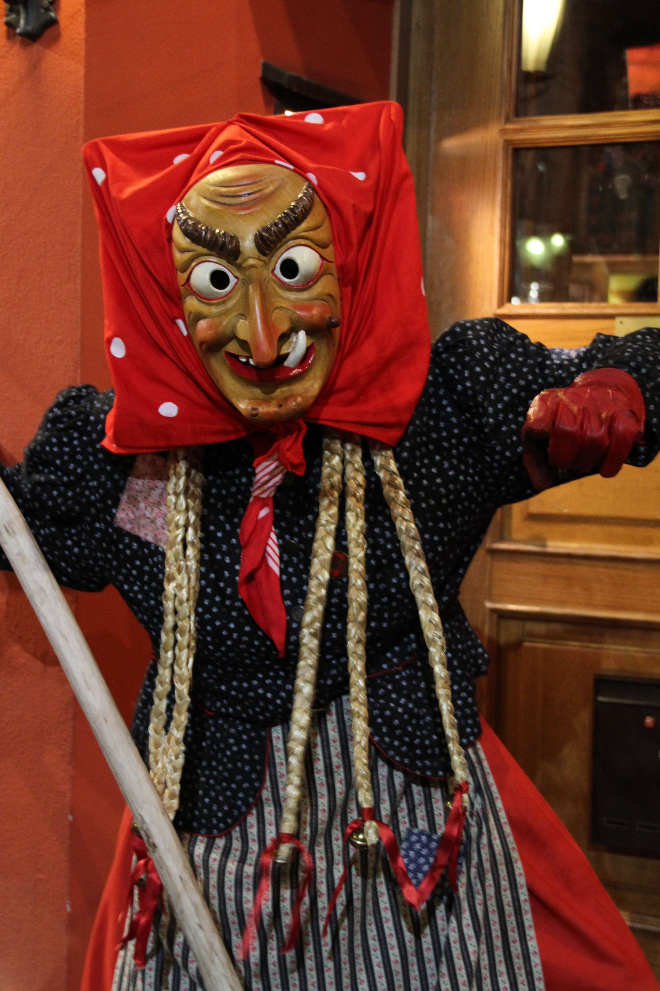 Original Offenburger Hexe